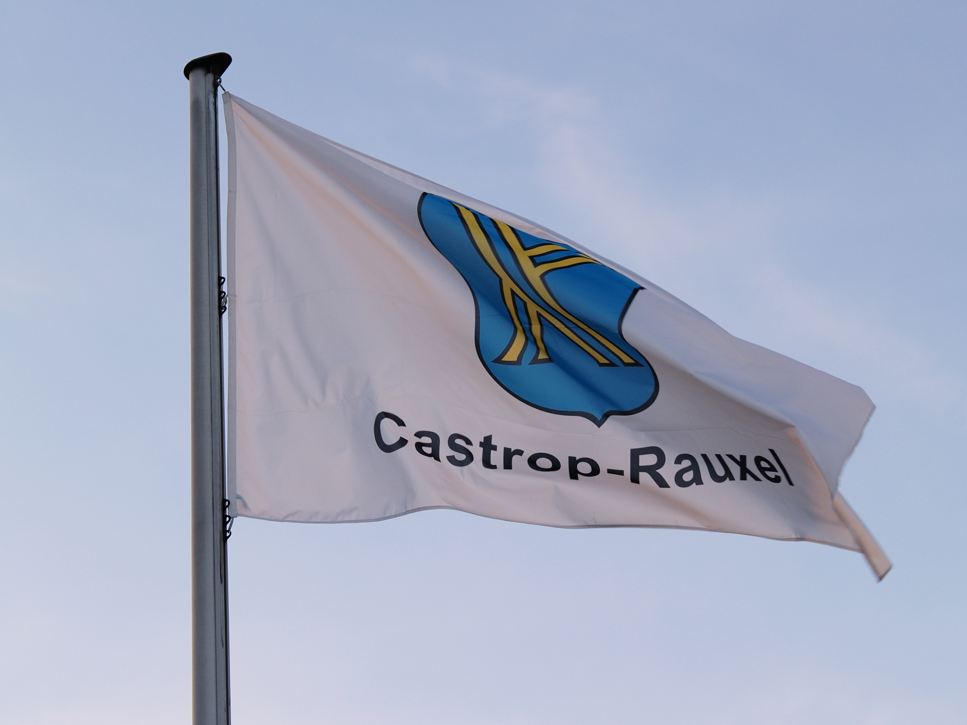 Schmuckflagge von Castrop-Rauxel